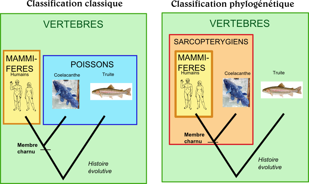 Comapraison des classifications classique et phylogénétique